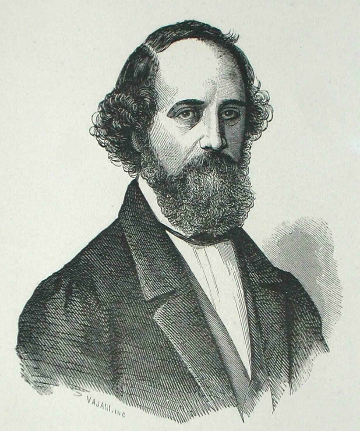 Marchese Anselmo Guerrieri Gonzaga